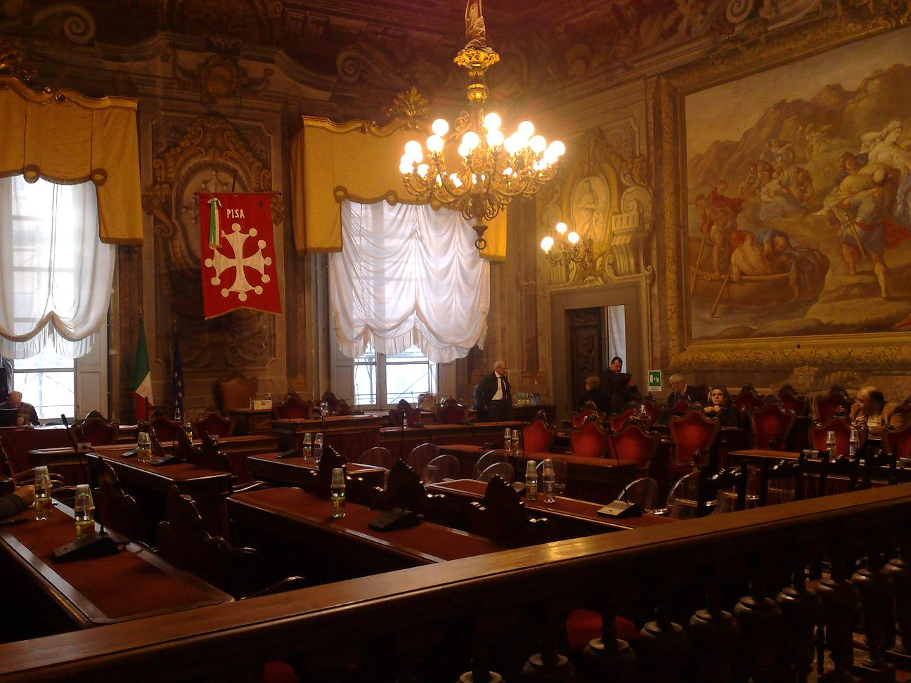 Pisa comune